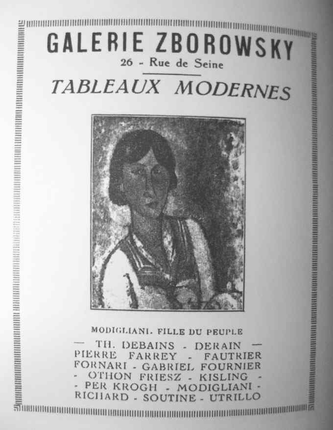 Advertising poster: GAlerie Zborowsky, 26 - Rue de Seine, Tableaux Modernes, Amadeo Modigliano. Fille du peuple